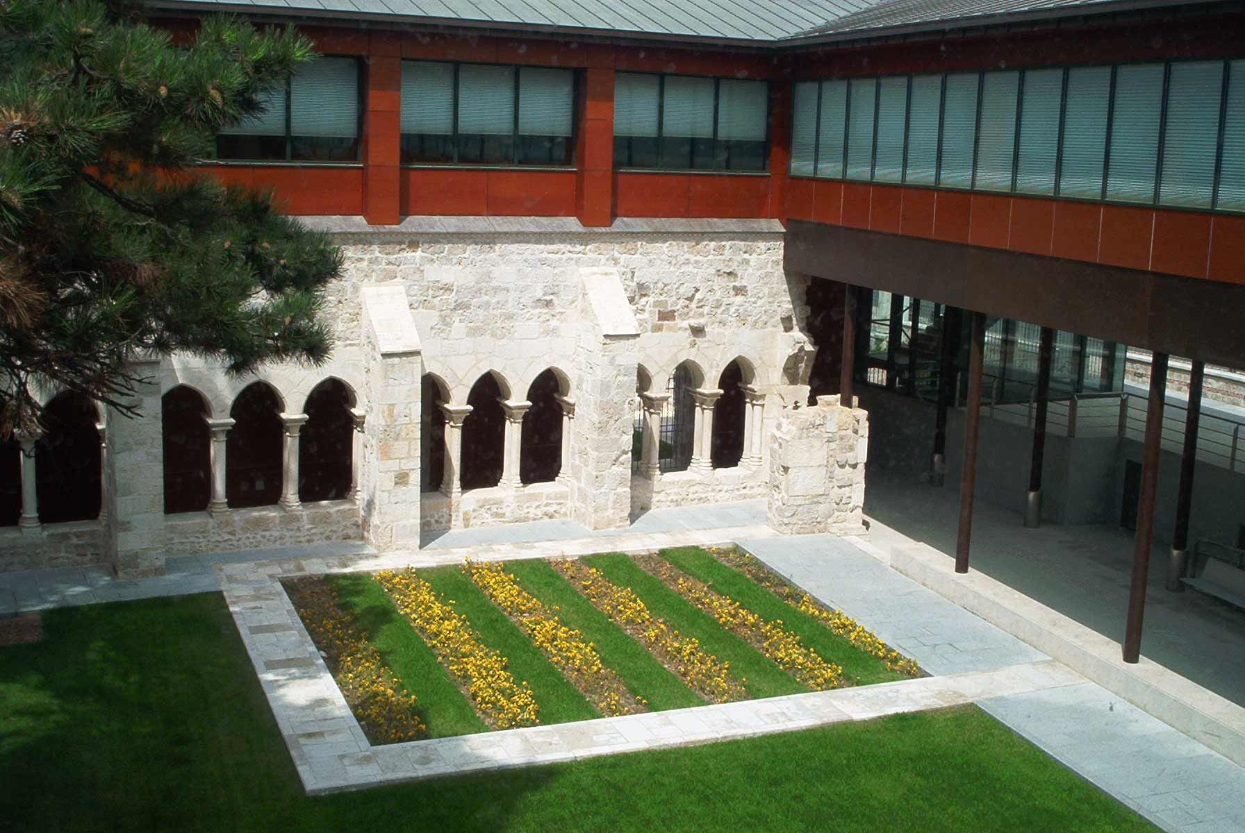 Imagen del Monasterio de San Agustín de Burgos